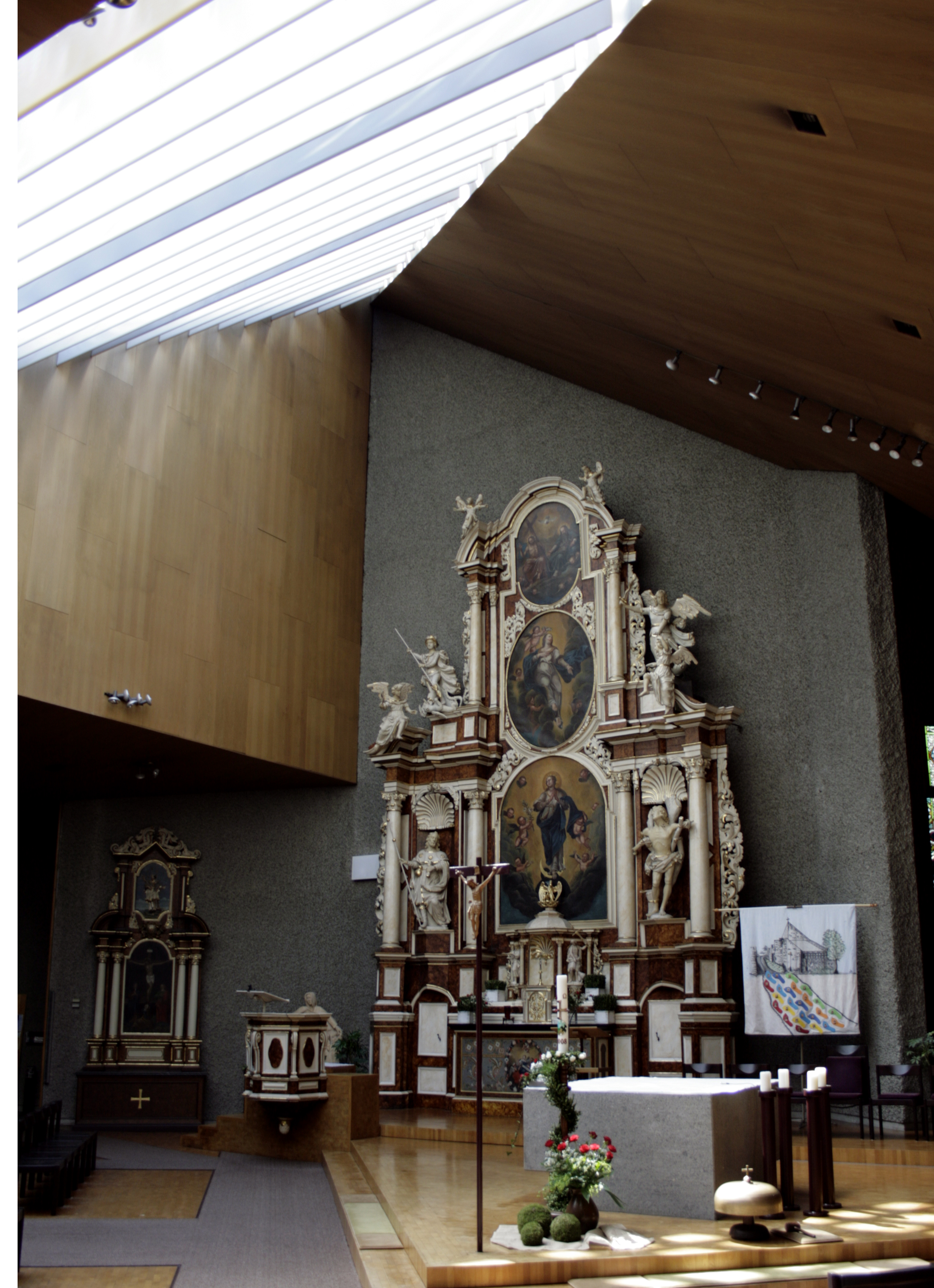 Neue Kirche in Lindenholzhausen, Deutschland, innen